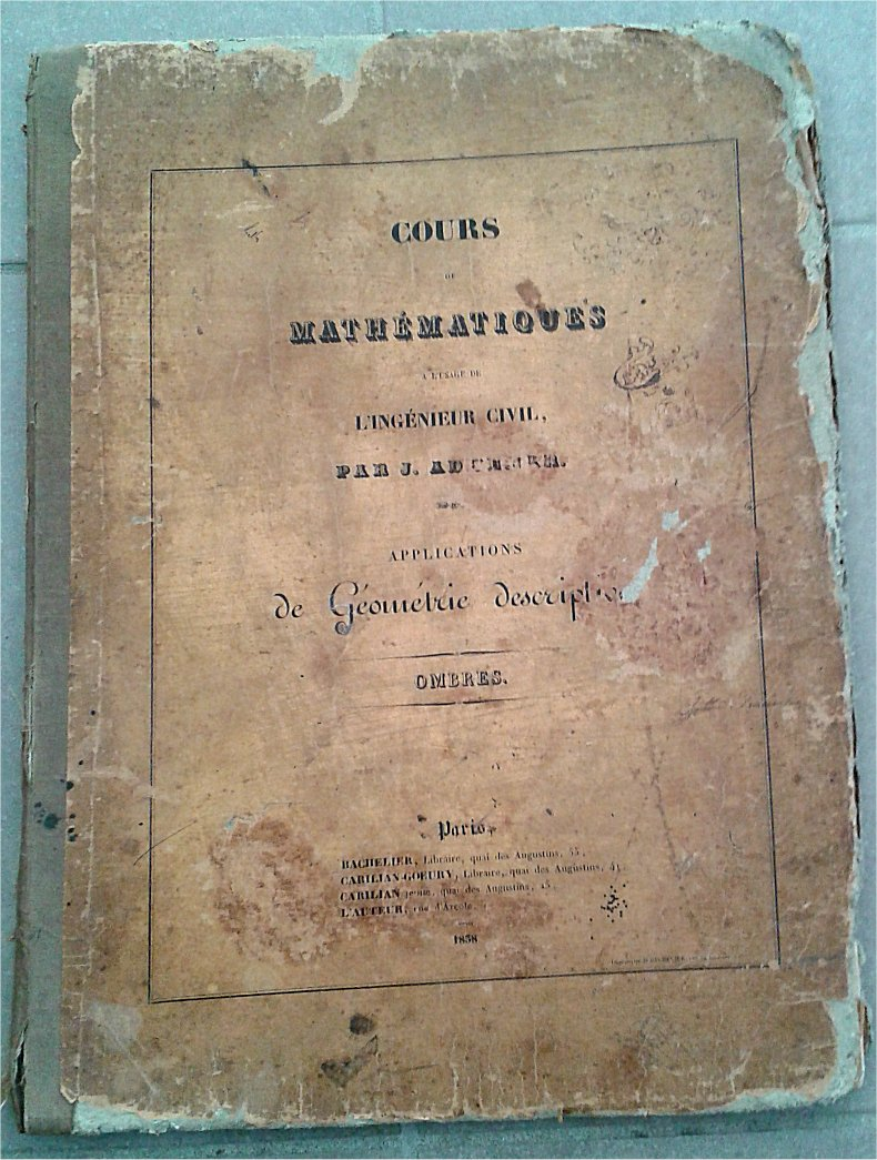 Cours de Mathematiques a l'usage de l'Ingenieur Civil par J. Adhémar - applications de Geometrie descriptive - Ombres - Paris 1838